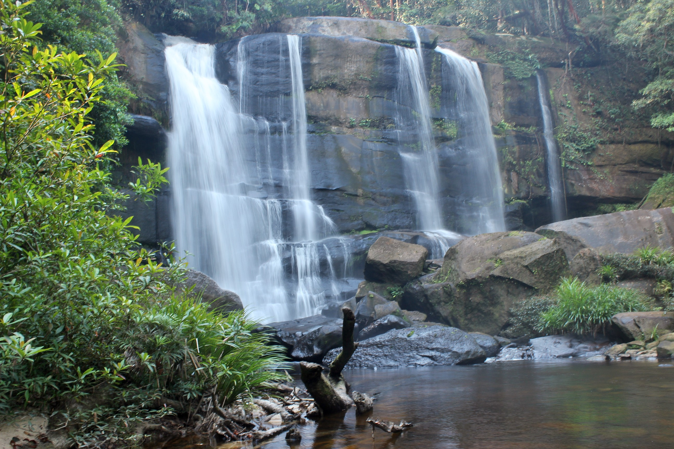 Air terjun tujuh tingkat atau air terjun rombo dait yang terdapat di kecamatan air besar kabupaten landak kal-bar.merupakan salah satu objek wisata alam yang belum banyak di ketahui masyarakat luas karna akses ke lokasi yang masih sangat sulit yang melewati jalan tanah,terdiri dari tujuh tingkatan yang saling berjauhan dan pada foto ini adalah tingkat yang ke tiga.